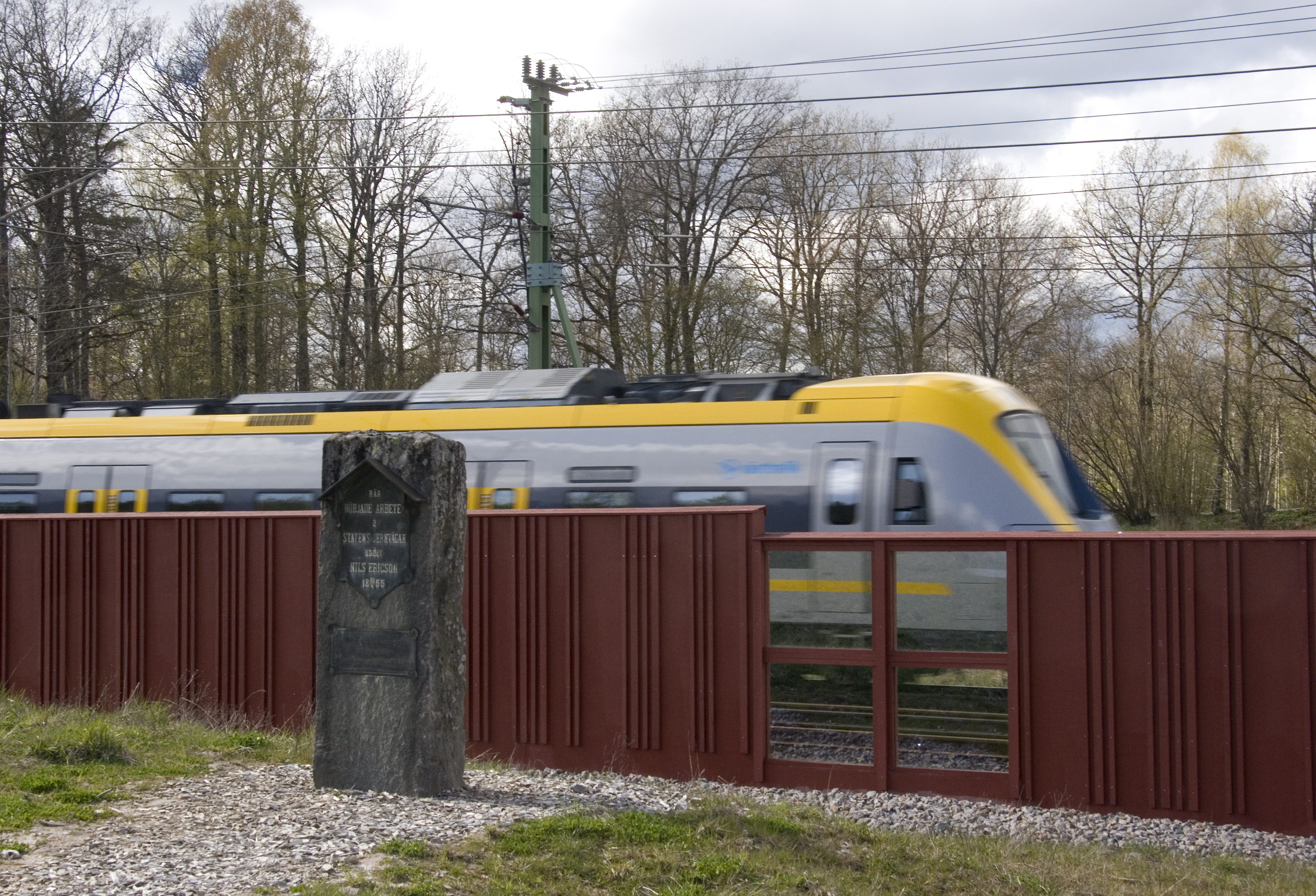 Skaverydsstenen, minnessten över det första spadtaget på Västra stambanan, 30 april 1855, vid Skaveryd, väster om Alingsås. Arbetschefen, kapten J. Westman fyllde några spadtag i den första skottkärran, som sedan kördes bort av arbetsförmannen Per August Skog. Därefter slog löjtnant Carl Adelsköld ner den första riktkäppen. Stenen restes vid 25-årsjubileet 1880. (Källa: Lars Berggrund och Sven Bårström, De första stambanorna : Nils Ericsons storverk, Sveriges Järnvägsmuseum, Gävle, 2014.) Bakom bullerplanket passerar pendeltåg från Göteborg mot Alingsås, i form av en motorvagn litt X61.